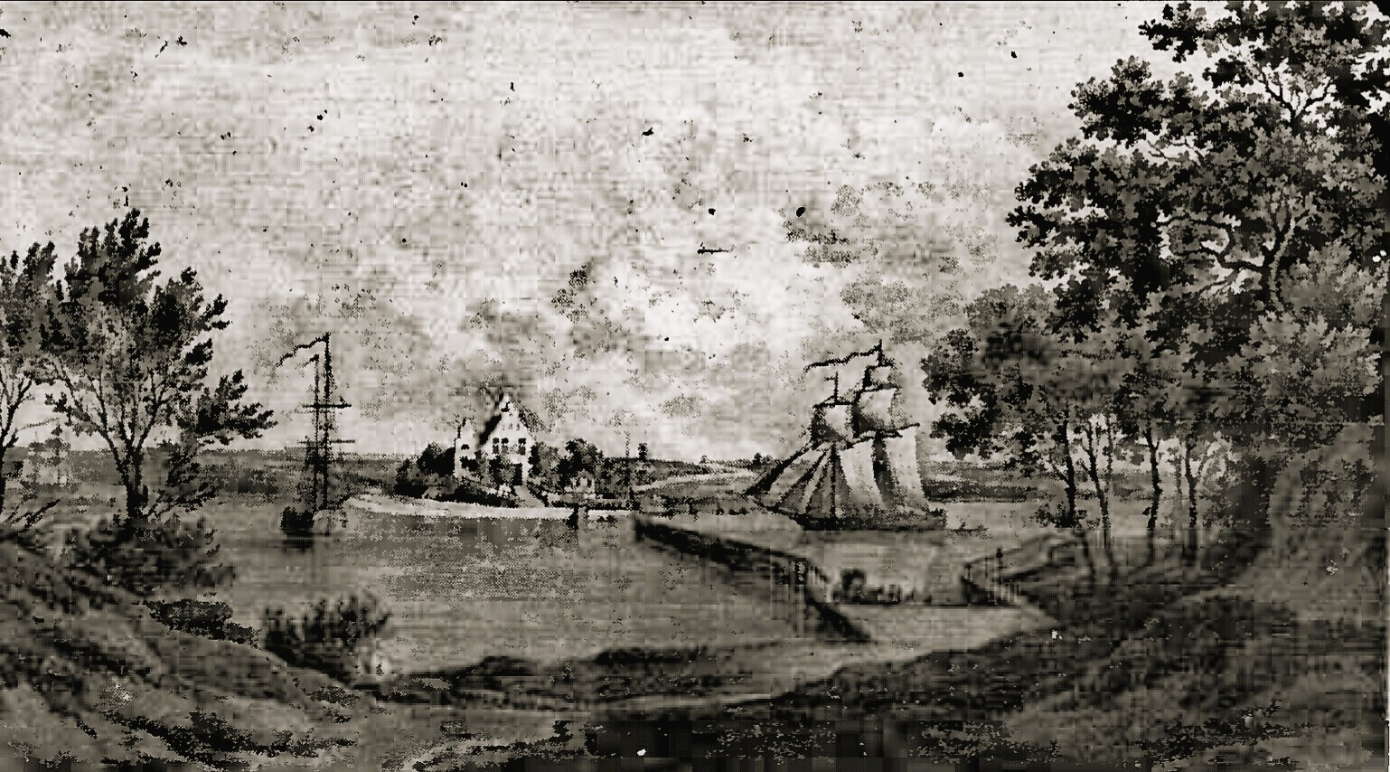 Ursprüngliche Lage der Herrenfähre am Fuße des Fährberges. Bis 1852 floss die Trave unmittelbar am Nordostabhang des Fährberges entlang. Das Haus des Fährmanns lag bis dahin am linken östlichen Ufer der Trave. In Folge der ersten Trave-Korrektion, des ersten Trave-Durchstiches, bei dem die Trave etwa 600m weiter nach Osten auf Travemünde zu verlegt wurde, gelangte das Fährhaus vom linken auf das rechte Traveufer. Hier floss sie in den Engpass der Siemser Endmoräne und dem Fährberg. Das Bild zeigt einen vorherigen Stahlstich von Eßlingen aus der Dr. Lehmkuhlschen Sammlung.